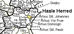 Sct. Johannes Sogn Århus, Hasle Herred, Århus Amt